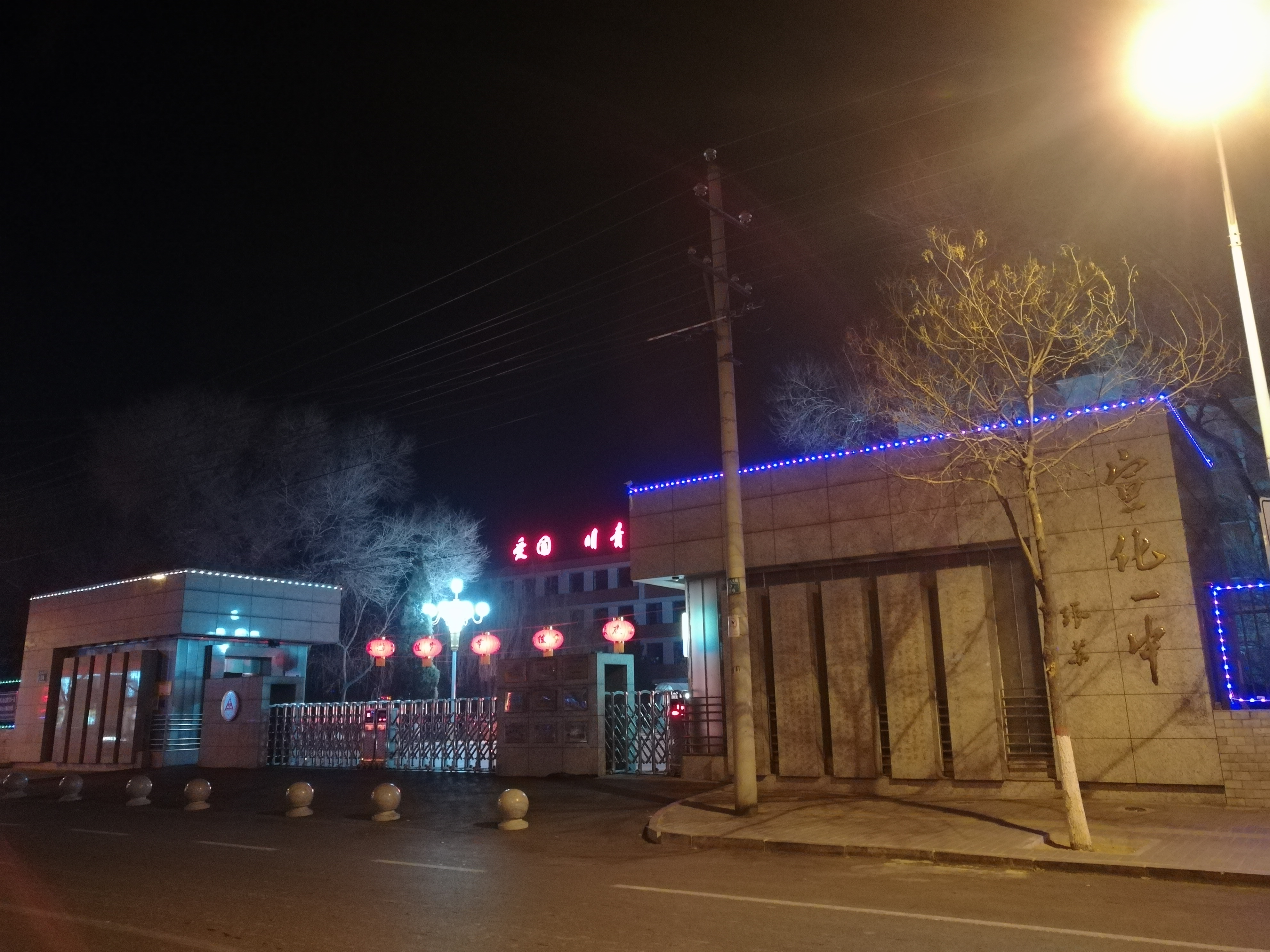 中文（中国大陆）: 这幅照片由NickNYCN拍摄于张家口市宣化区，照片内容为宣化一中正门夜景。